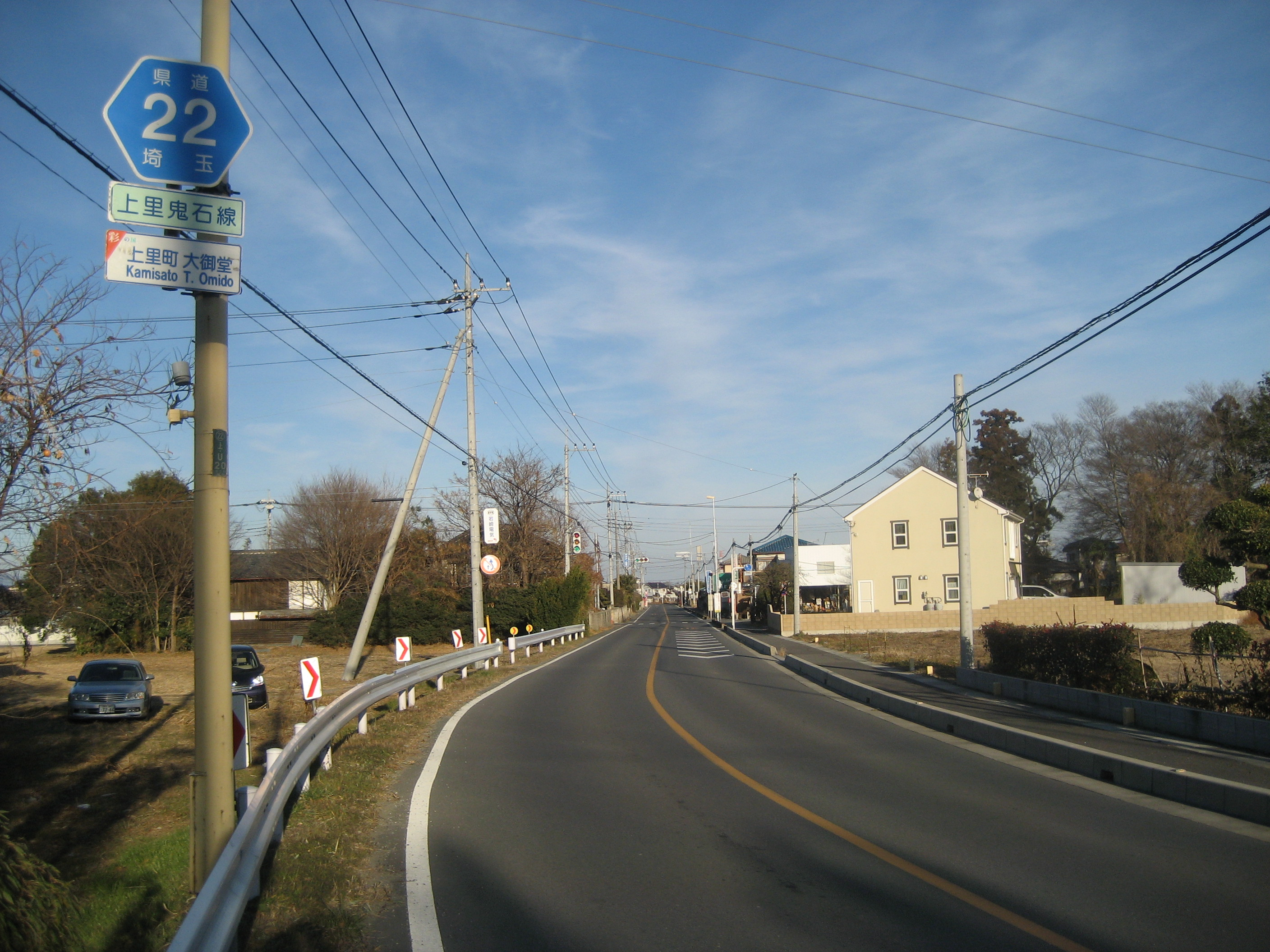 埼玉県道22号線上里町大御堂付近